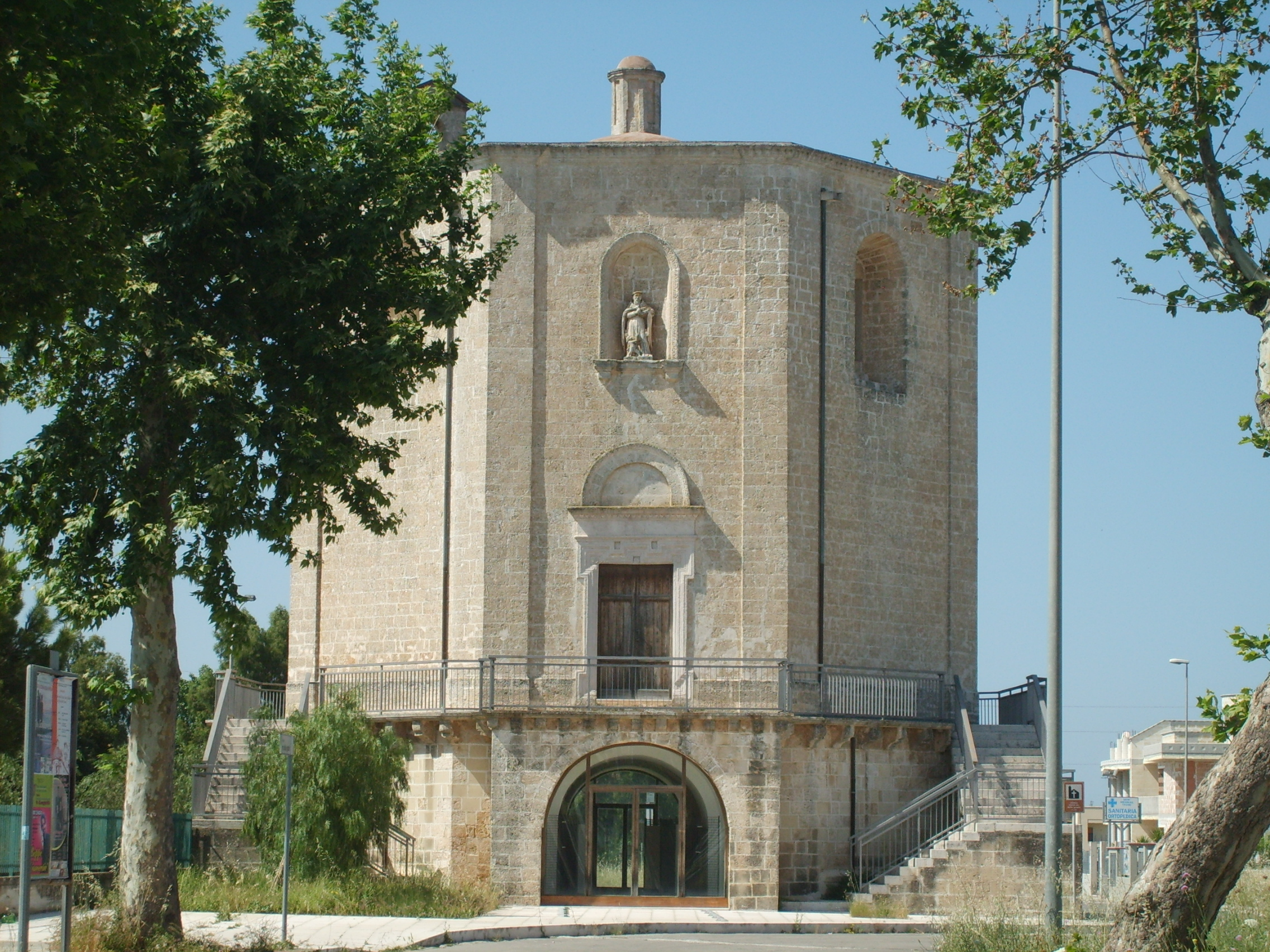 Chiesa Madonna delle Grazie